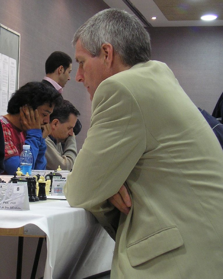 GM Glenn Flear (England)